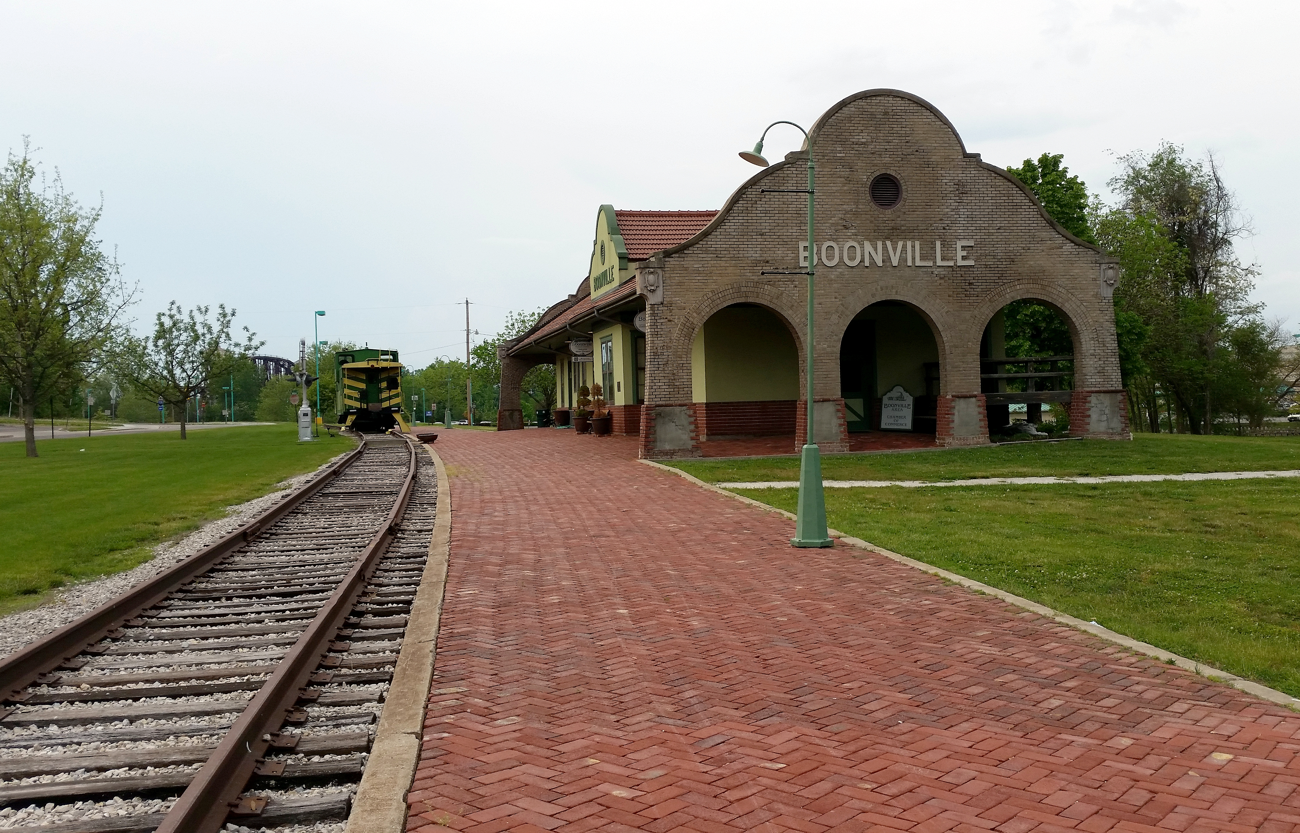 Boonville MO MKT Depot